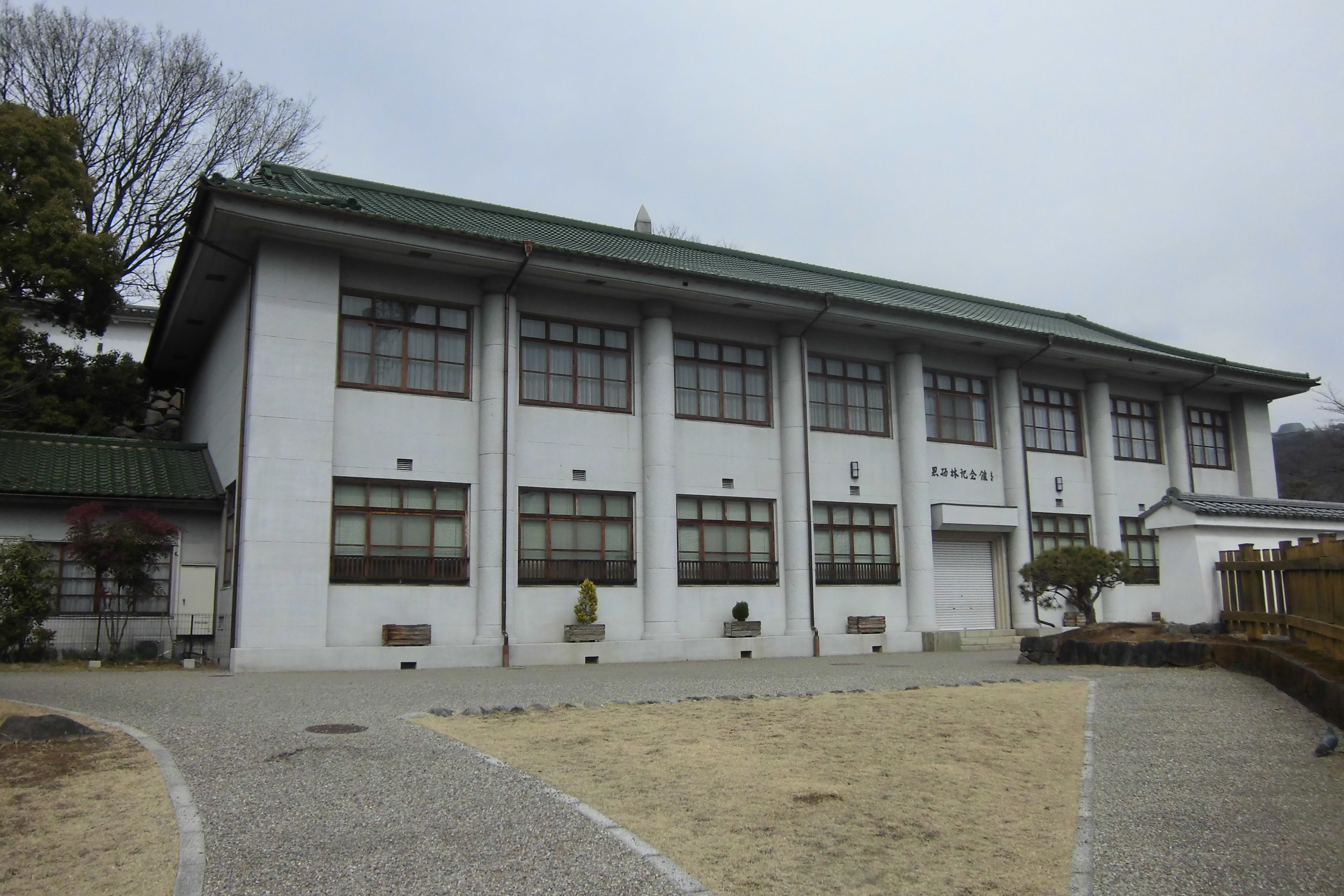 山梨県甲府市・甲府城跡の恩賜林記念館